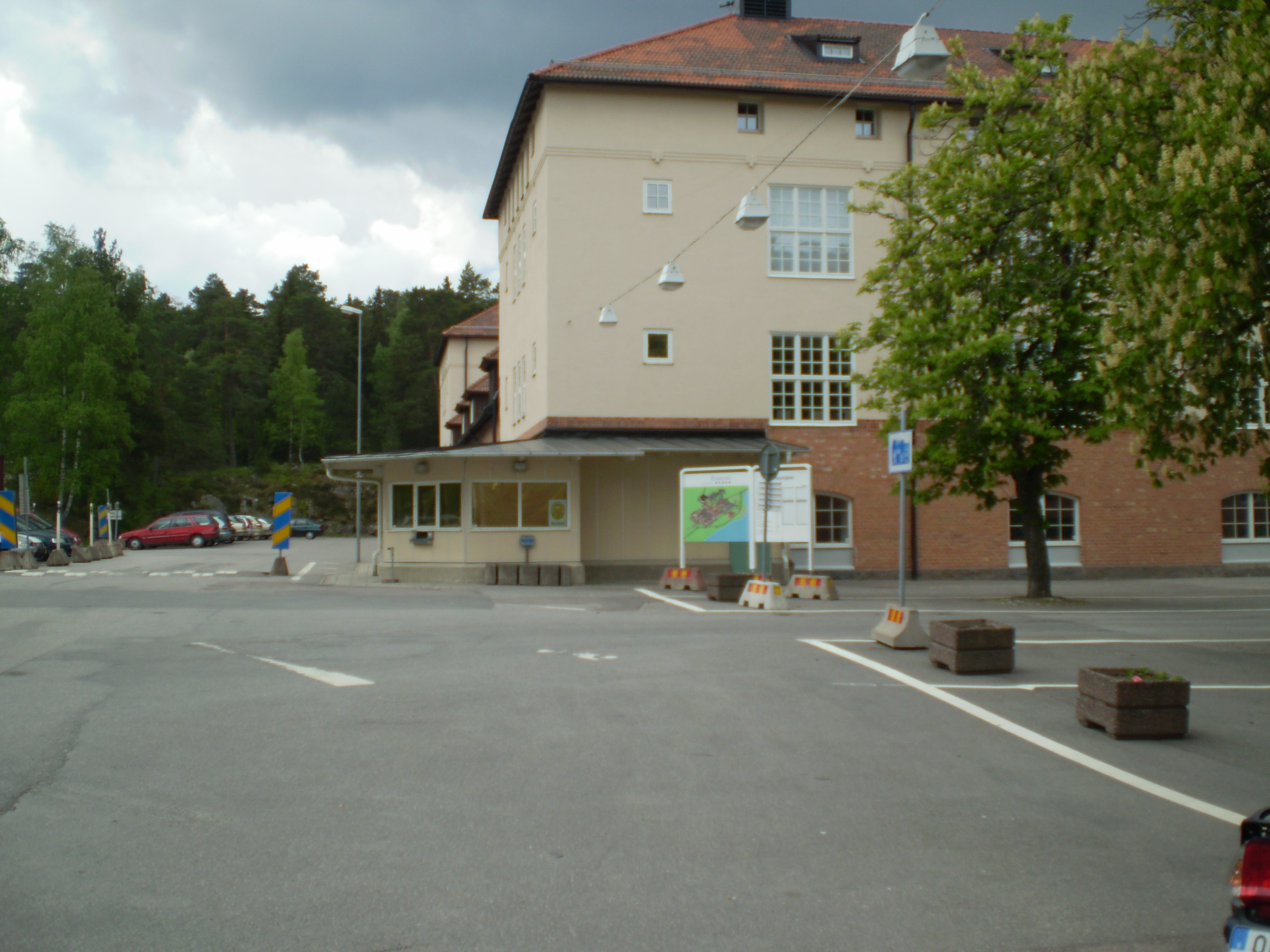 Garnisonsvakten vid Södermanlands regemente i Strängnäs. Till höger ses två hästkastanjer (Aesculus hippocastanum).